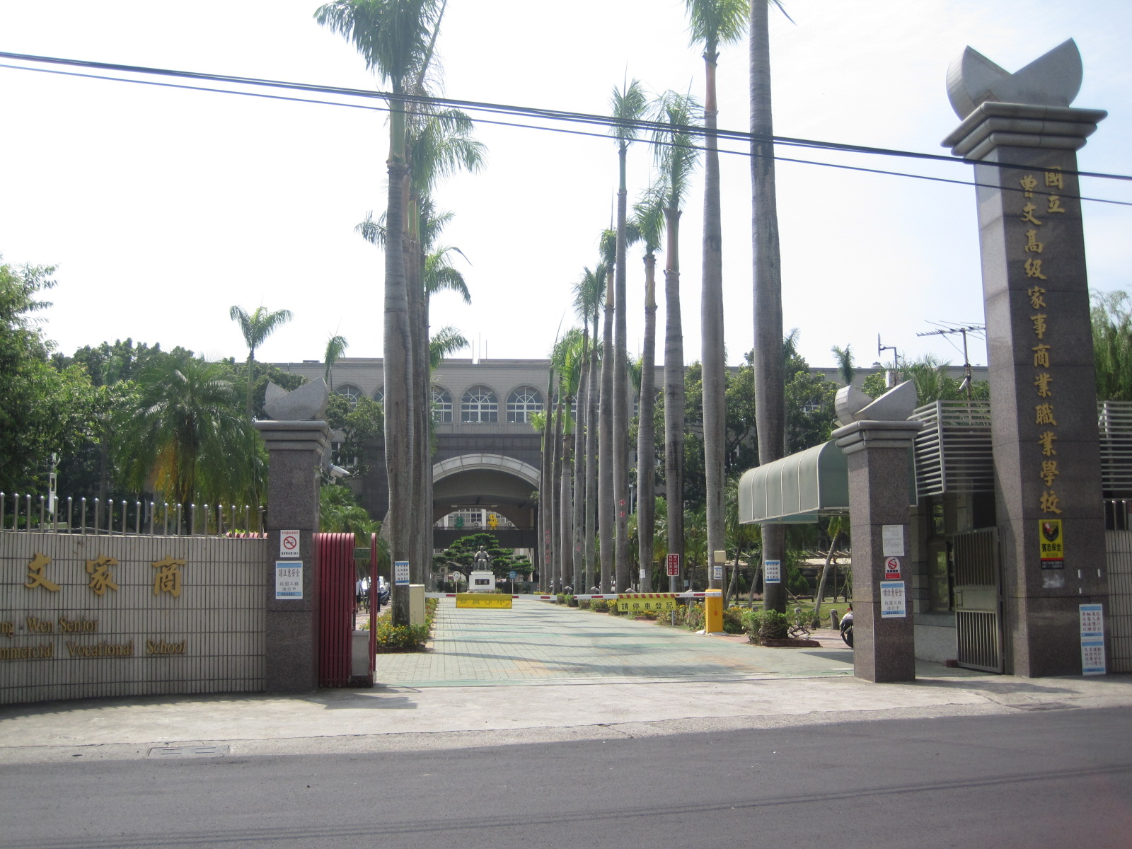 國立曾文高級家事商業職業學校校門